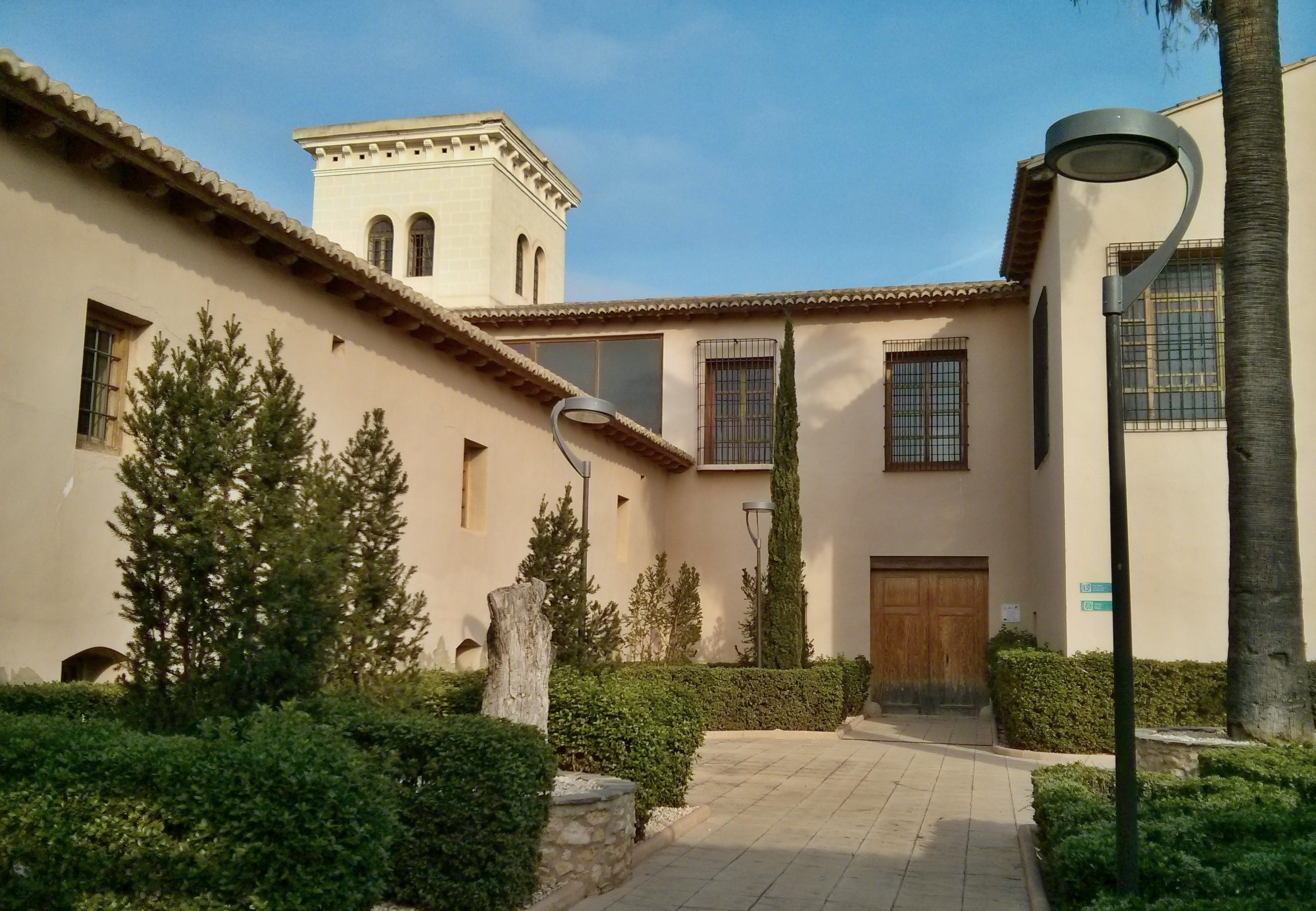 La Torre del Virrey , también llamada Torre Baba, forma parte de una finca que se halla a poco más de medio kilómetro del núcleo urbano de La Eliana, en la comarca de El Campo del Turia, de la provincia de Valencia; junto a la vía del ferrocarril y el límite con el municipio de La Puebla de Vallbona. Está catalogada como Bien de interés cultural, con anotación ministerial número R-I-51-0010675 y fecha de anotación 27 de agosto de 2001.